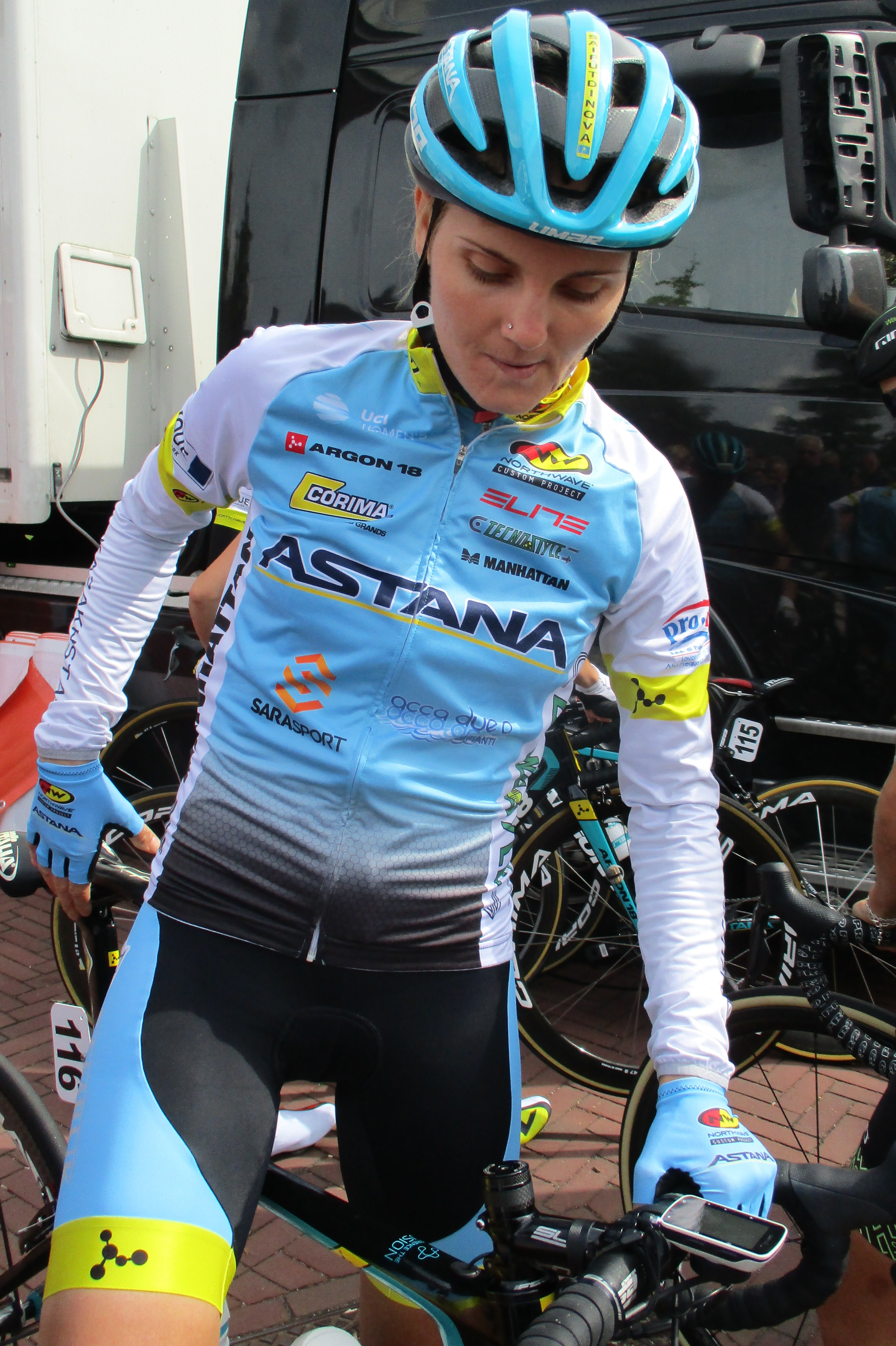 4e etappe van de Boels Ladies Tour 2018 door Noord-Limburg, start in Stramproy.